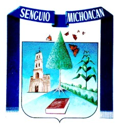 Stemma Senguio - Michoacán